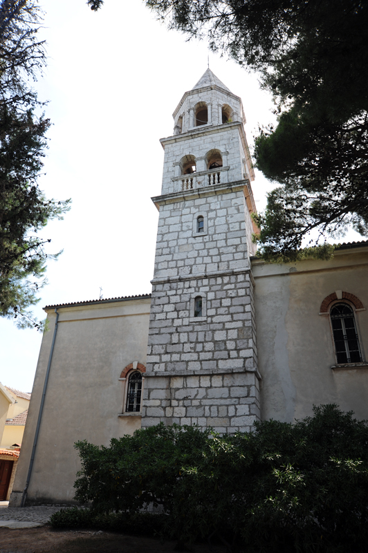 Biograd na Moru